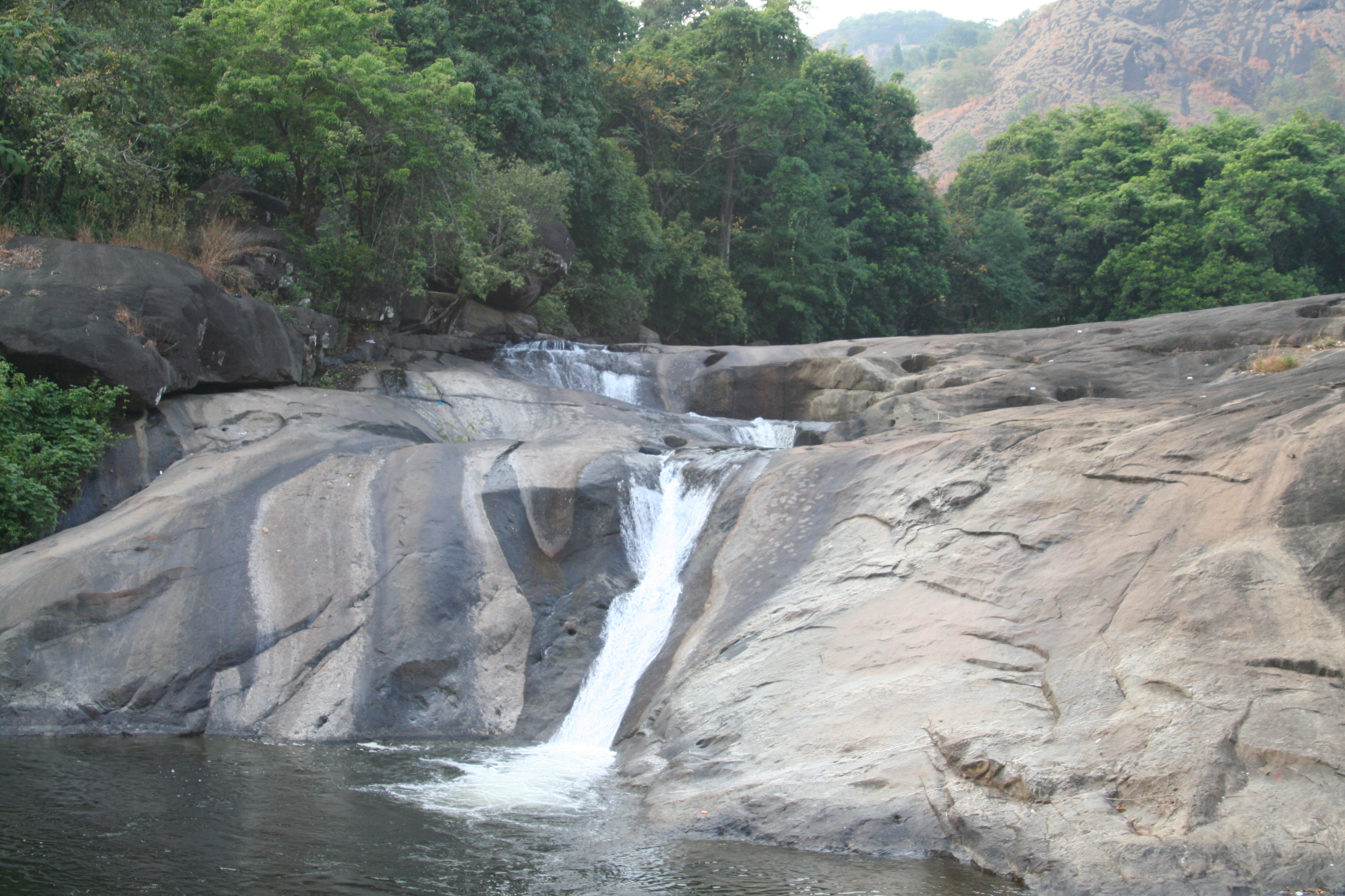 നിലംബൂരിലെ ആഢ്യൻ പാറ വെള്ളച്ചാട്ടം.